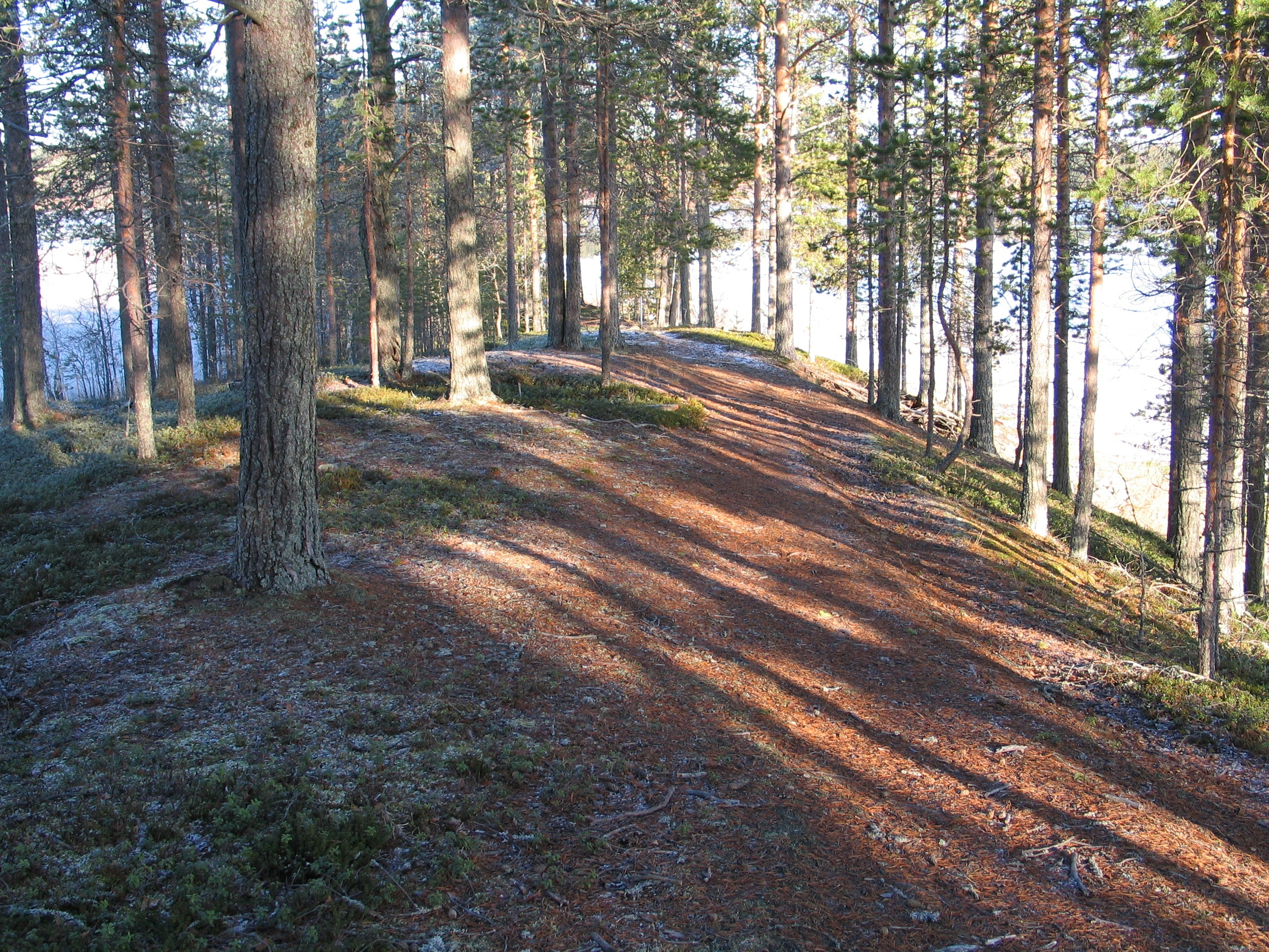 Suomussalmen Kalmosärkkä 2006